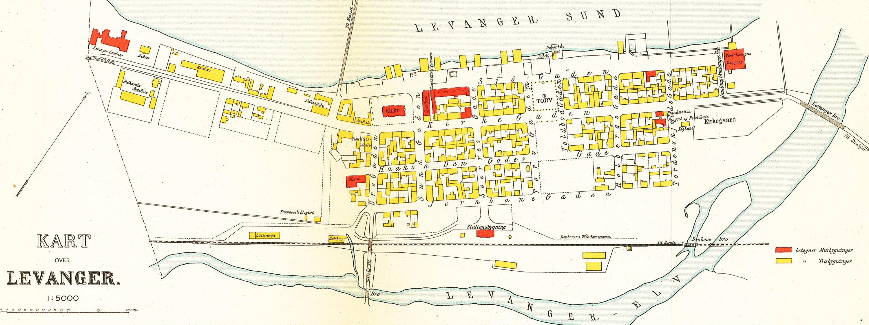 Kart over Levanger, 1909